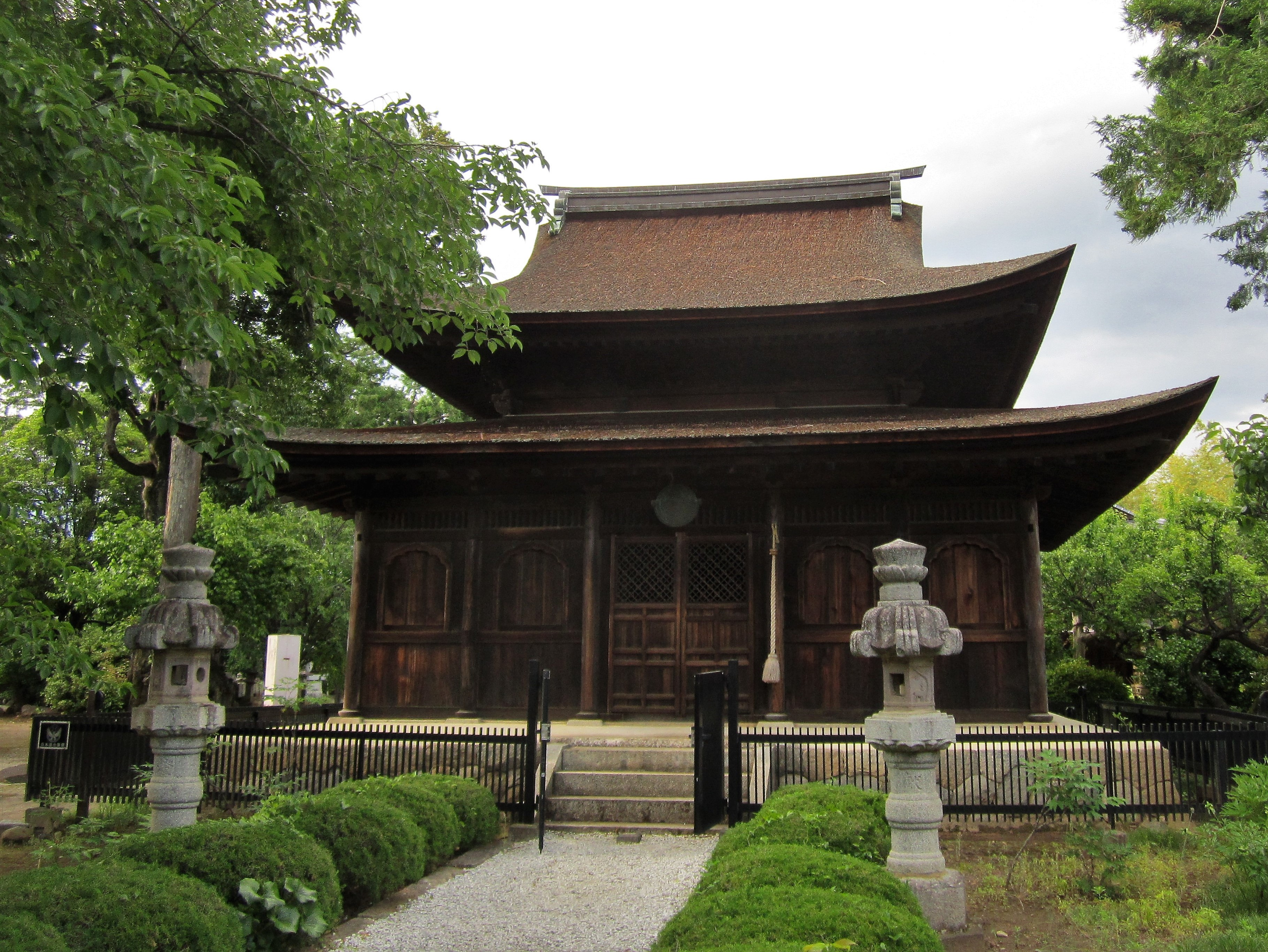 清白寺仏殿（山梨市三ケ所）